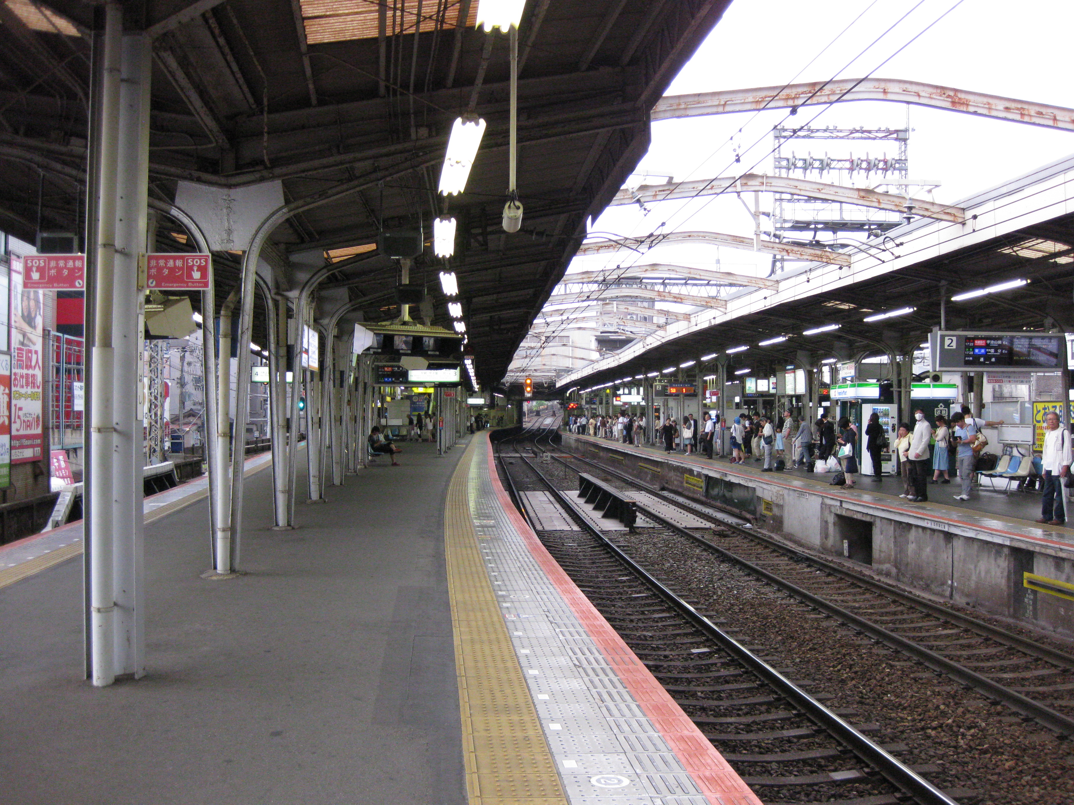 近鉄鶴橋駅プラットホーム